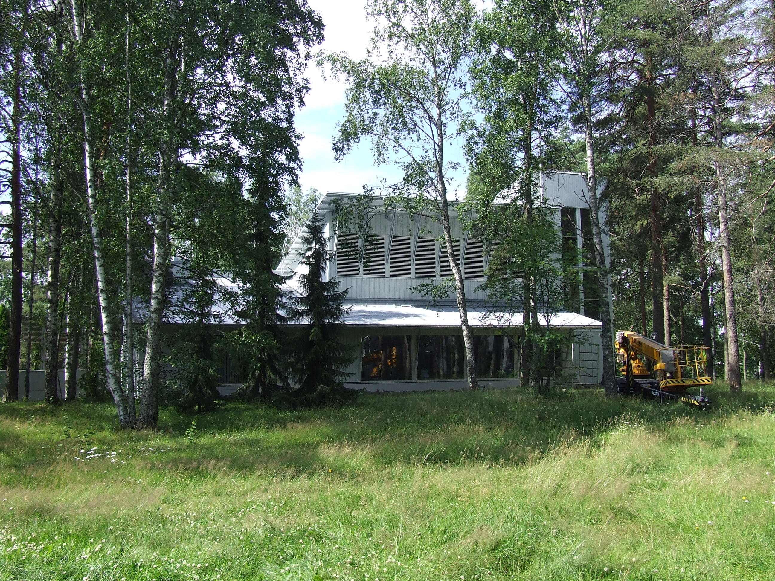 Katolinen Pyhän Ursulan kirkko Kouvolassa.